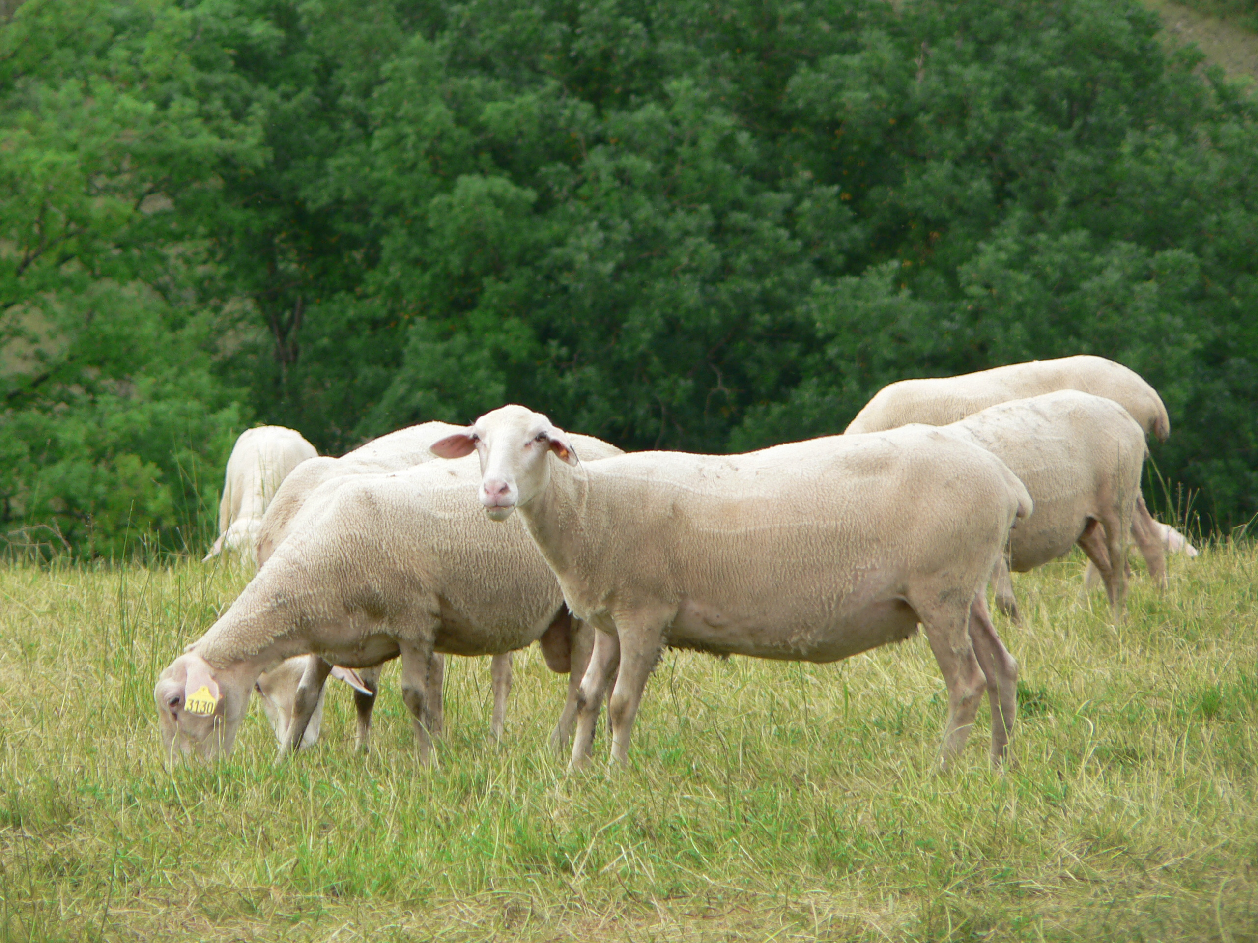 Photographie de brebis LACAUNE